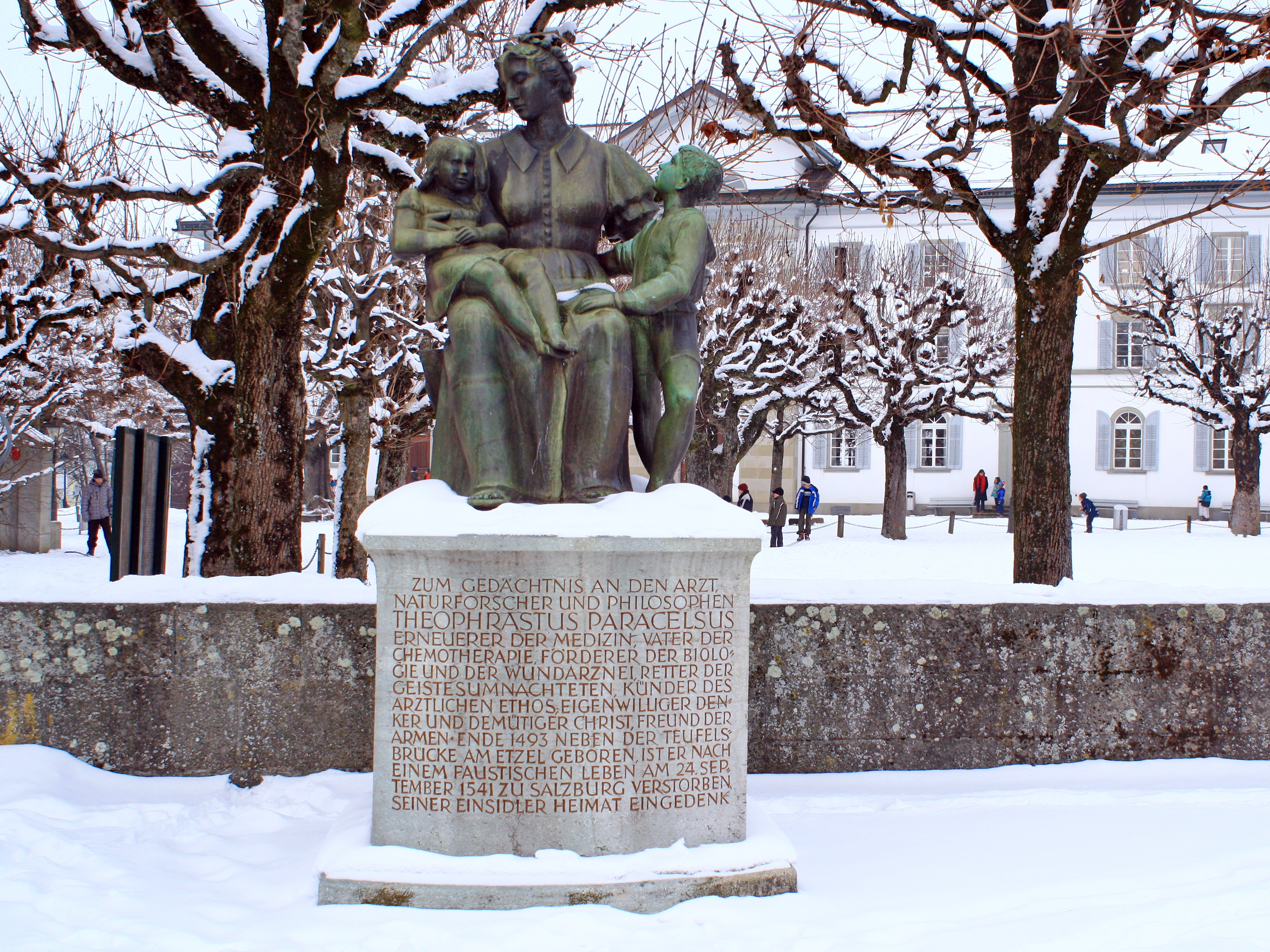 Paracelsus-Park in Einsiedeln (Switzerland)